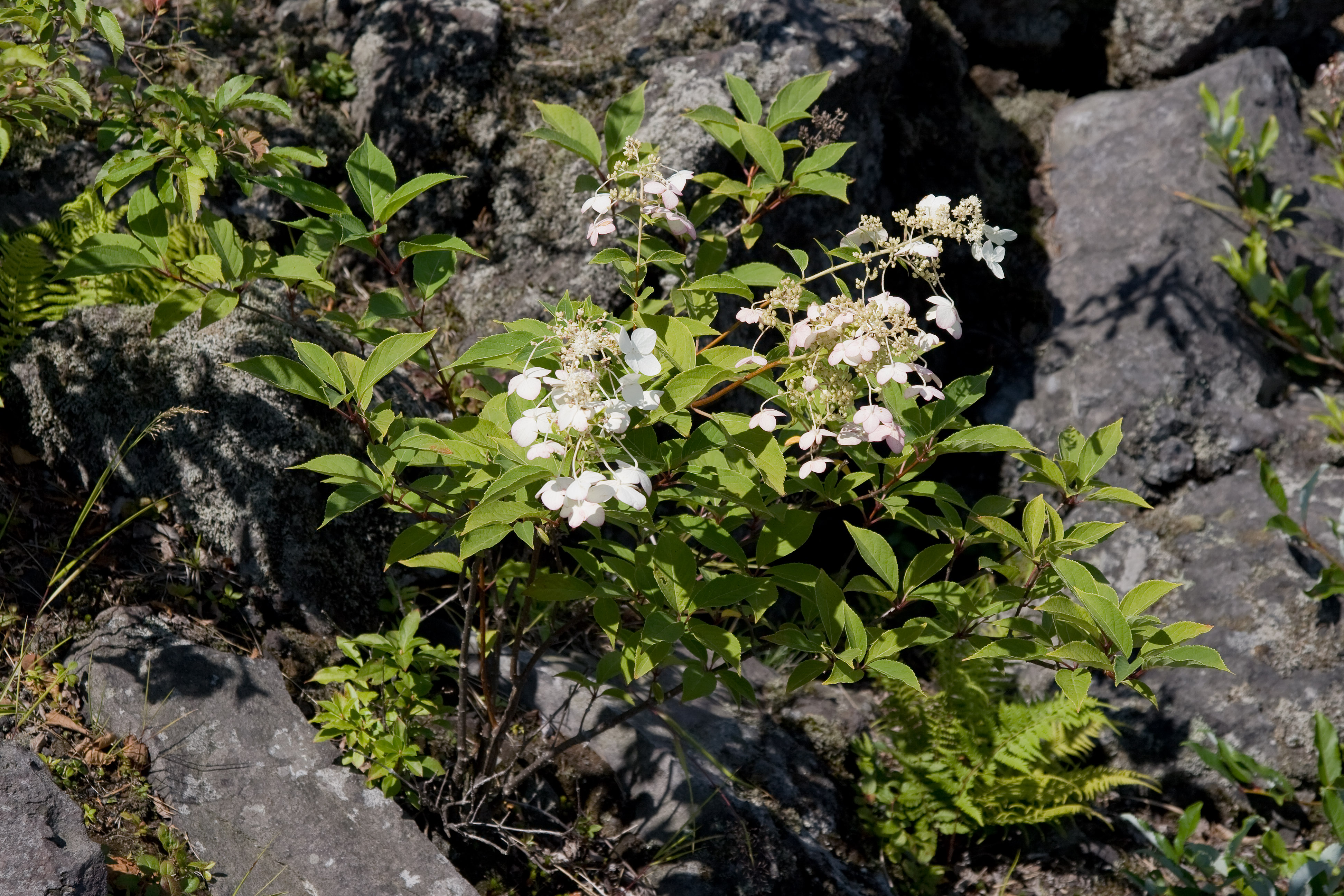 ノリウツギ (学名：Hydrangea paniculata）